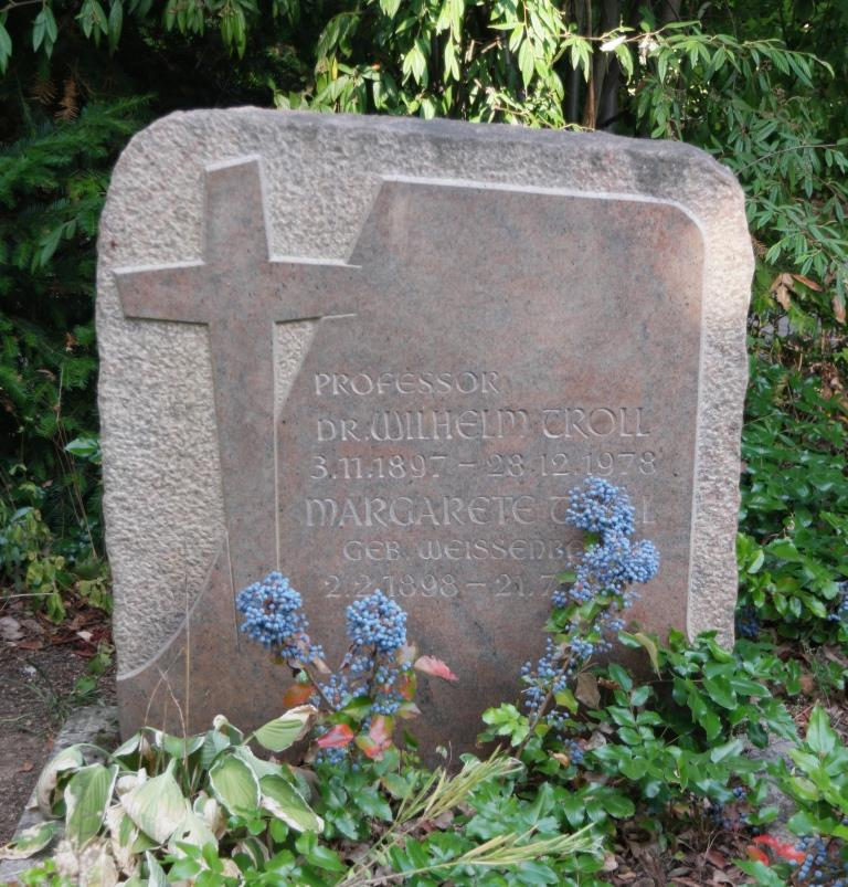 Grab des Botanikers Wilhelm Troll, 1897-1978, auf dem Hauptfriedhof Mainz